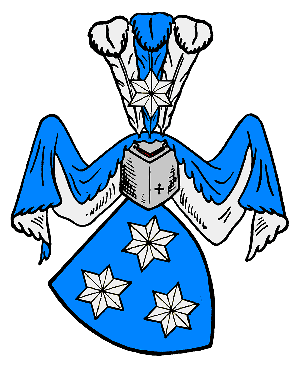 Stammwappen derer von Blanckensee